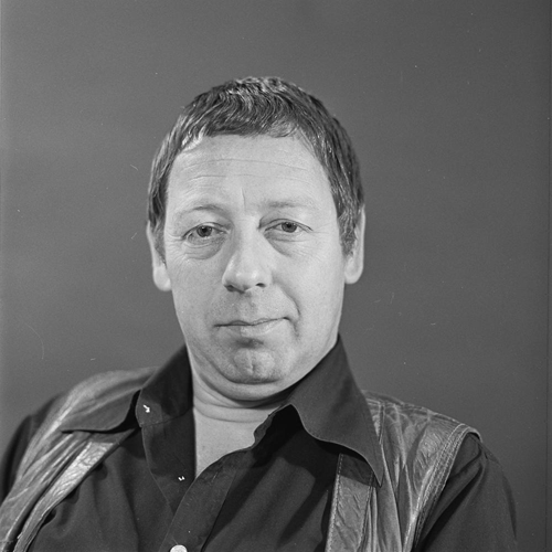 Cees van Ooyen